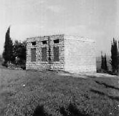 בית הספר בכפר אבו זריק